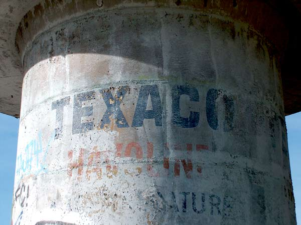 Keimolan moottorirata, syksy 2005, kuva: Nalle Westman